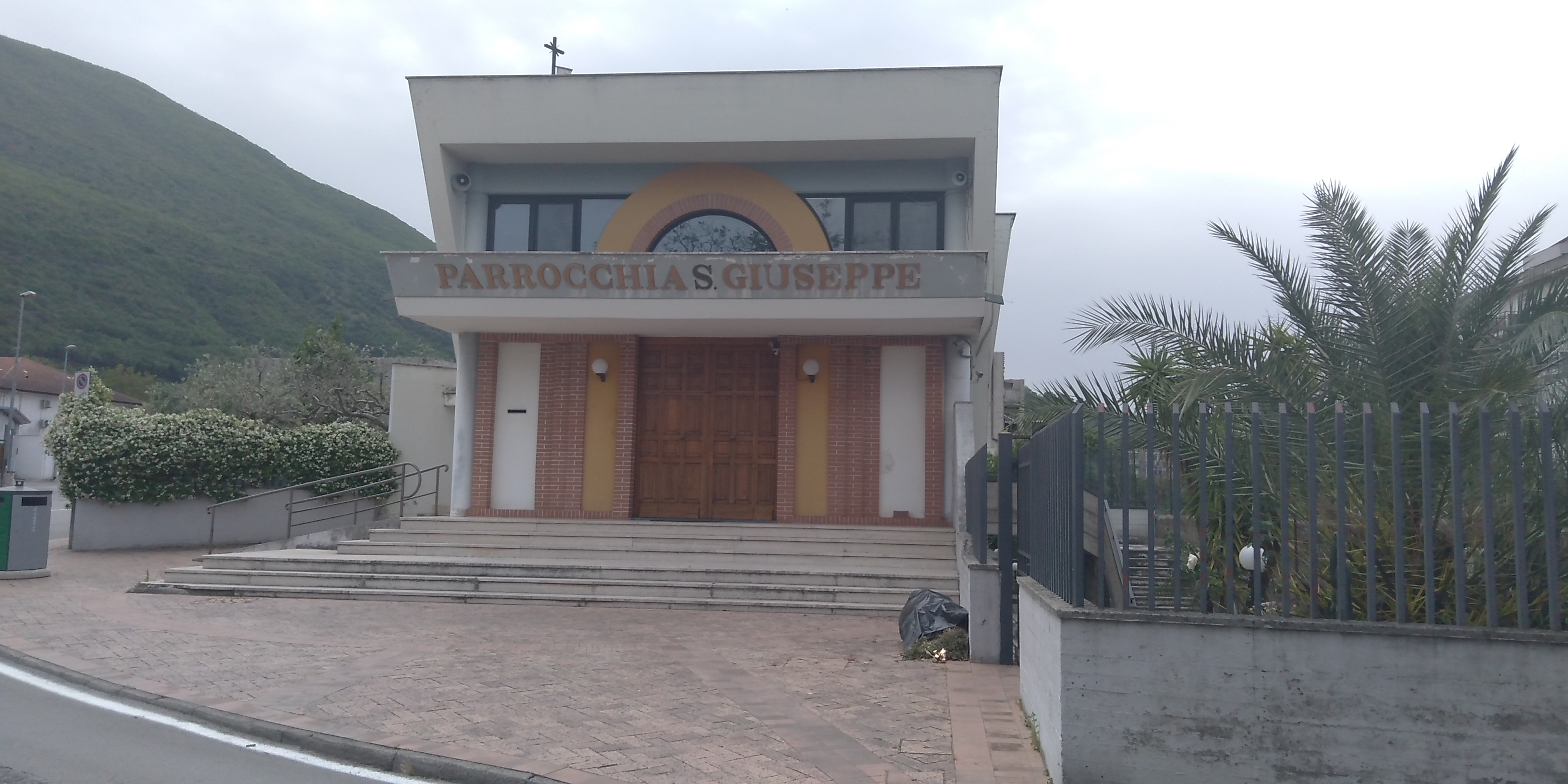 Chiesa di San Giuseppe a Nocera Inferiore